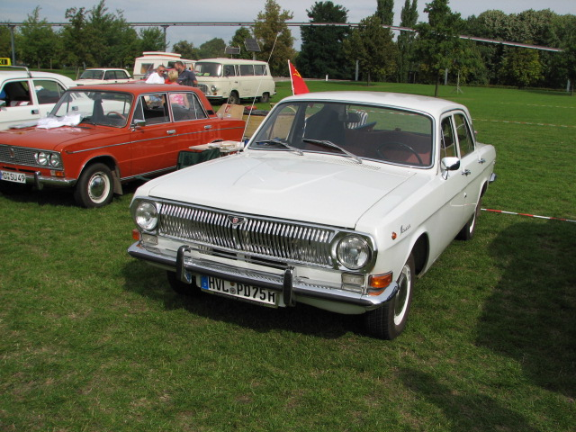 Wolga